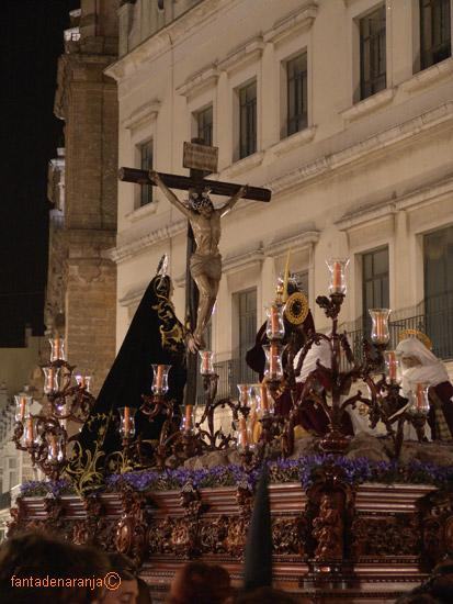 cristo de la vera-cruz